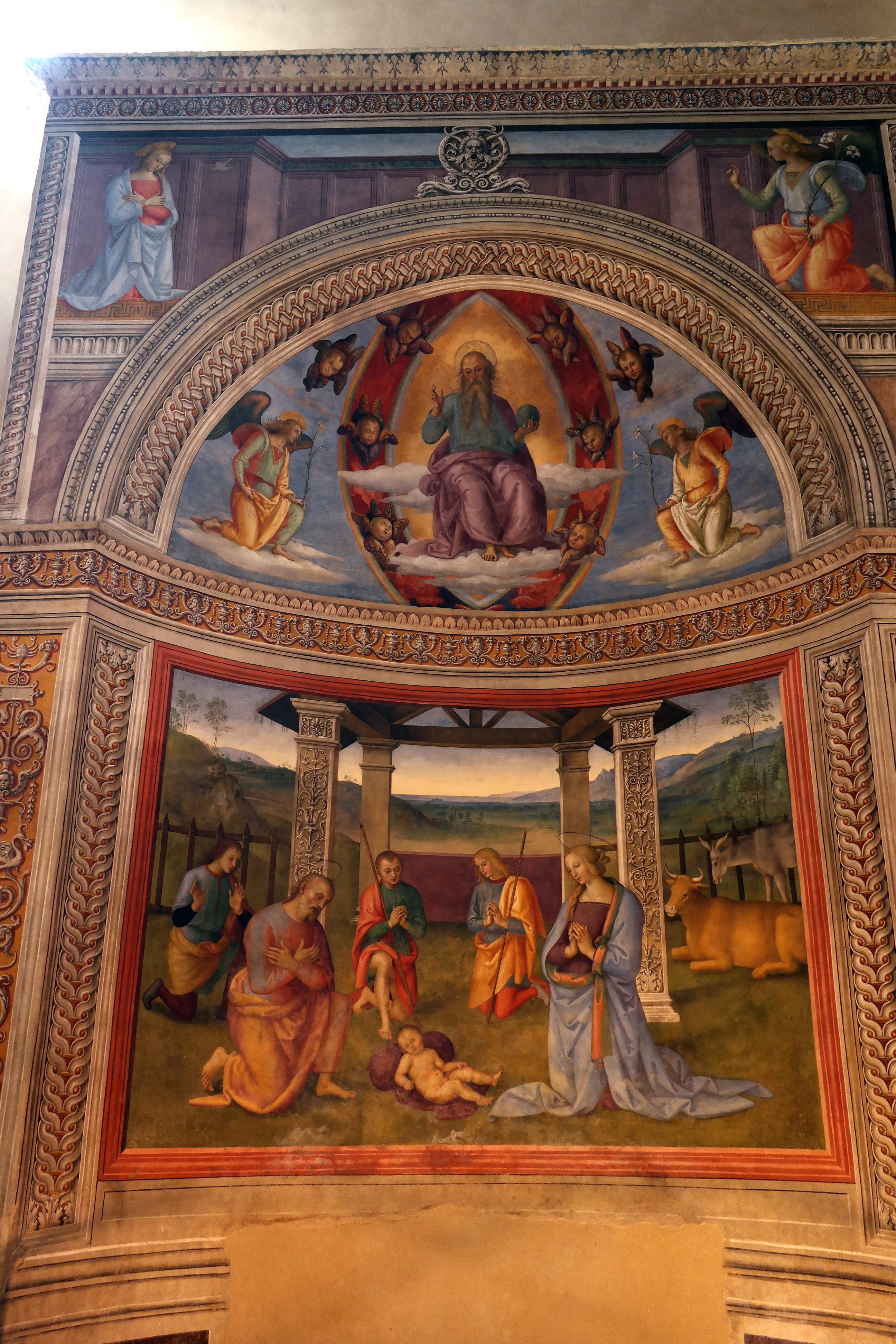 Nicchia affrescata dal Perugino all'unterno della Chiesa di San Francesco a Montefalco